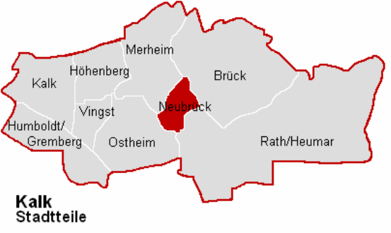 Lagekarte Neubrück im Stadtbezirk Köln-Kalk